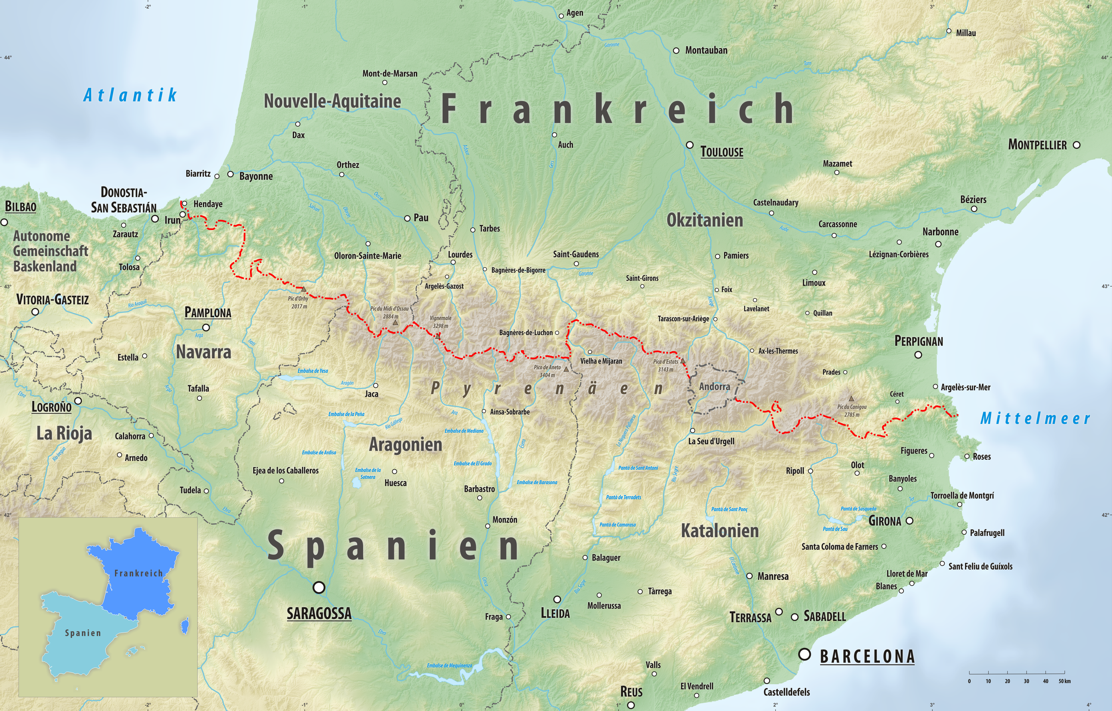 Reliefkarte des Grenzverlaufes zwischen Frankreich und Spanien Topographischer Hintergrund: NASA Shuttle Radar Topography Mission (public domain). SRTM3 v.2.